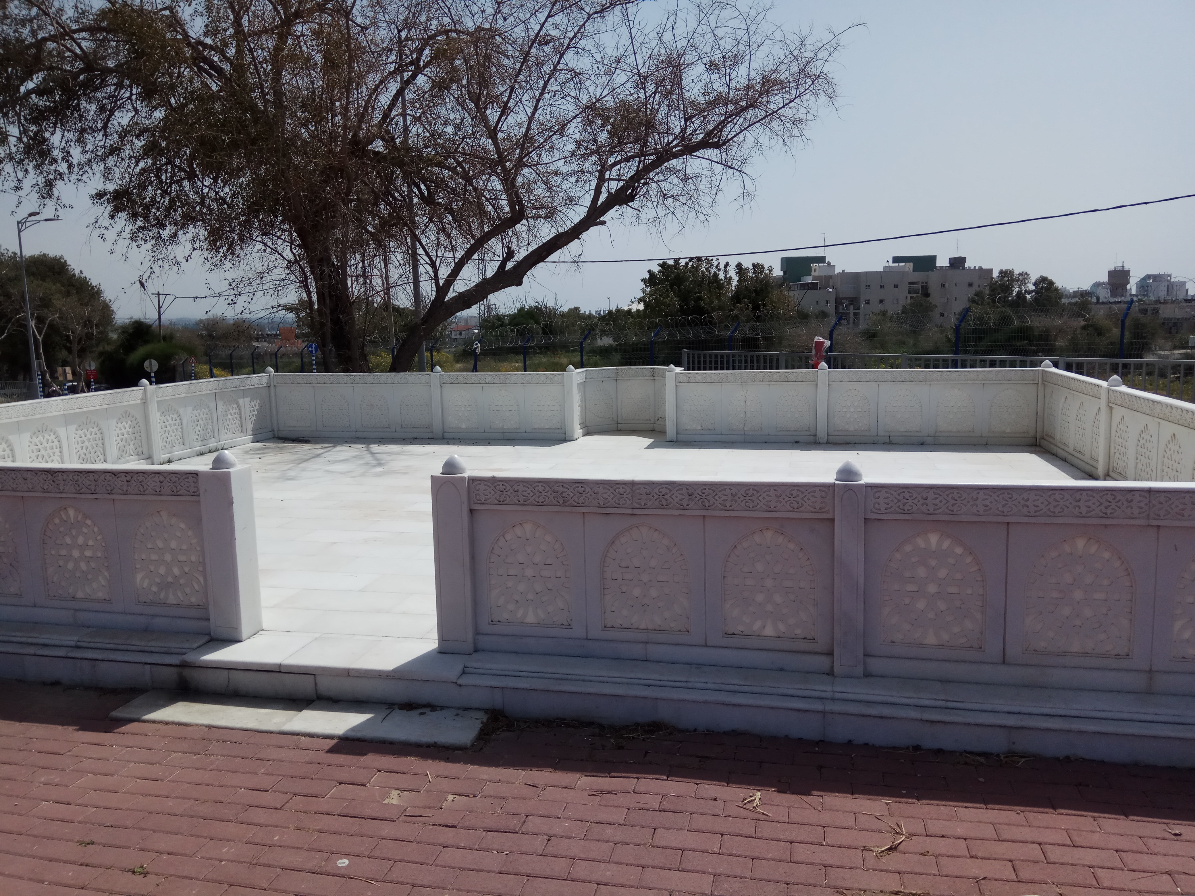 ציון חוסיין במרכז רפואי ברזילי באשקלון